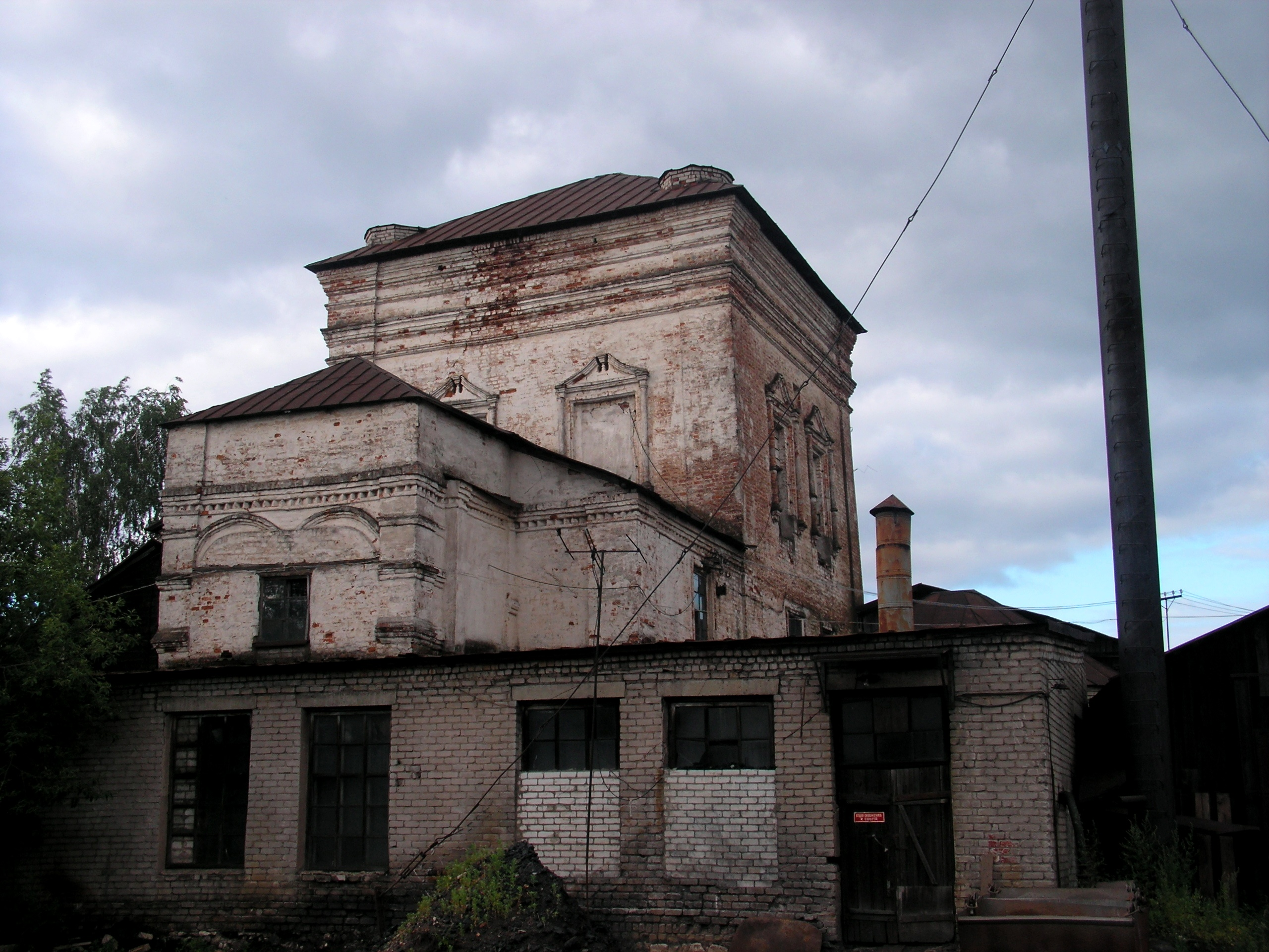 Собор Сошествия Святого Духа (Троицы): улица Лермонтова, Торопец, Торопецкий район, Тверская область